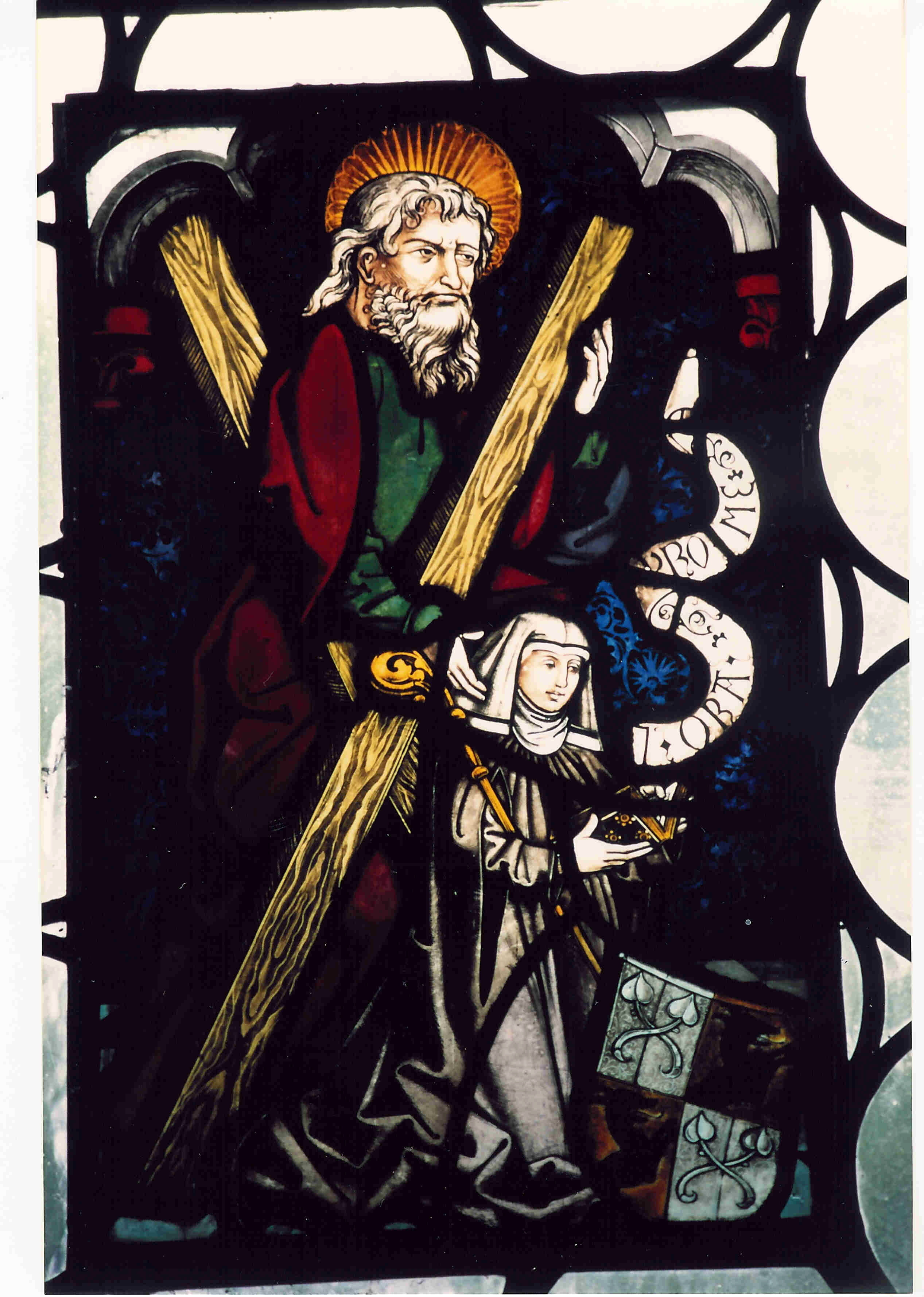 Glasfenster in der Kirche von Salmanskirchen bei Ampfing in Bayern (Deutschland) mit einem Bildnis der Äbtissin Ursula von Frauenchiemsee, geborene Maria Pfäffinger, mit Ihrem Äbtissinenwappen (Frauenchiemsee in 1 und 4, Pfäffinger in 2 und 3) und dem Heiligen Andreas. Glasmalerei. Ursprünglich in der Schloßkapelle eingebaut, von dieser anläßlich deren Demolierung in die Dorfkirche "Zu den beiden Johannes" übertragen.